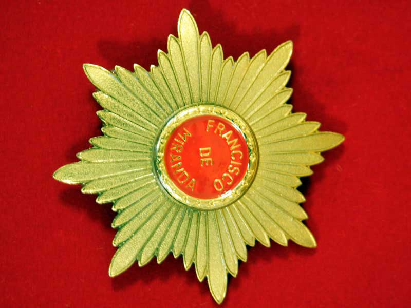 Medalla Orden Francisco de Miranda.